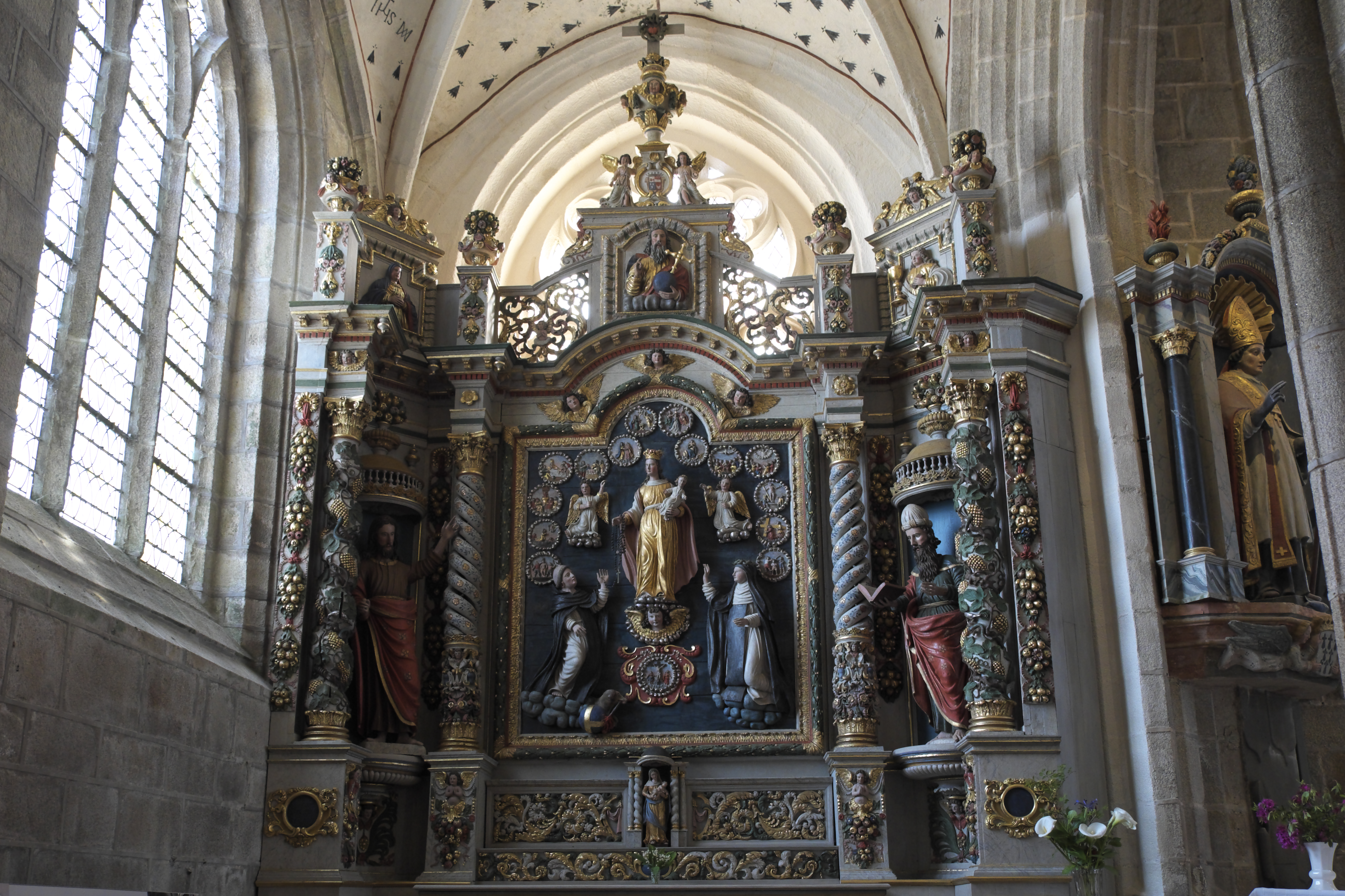 Katholische Kirche Saint-Ronan in Locronan im Département Finistère (Region Bretagne/Frankreich), Rosenkranzaltar (Base Palissy PM29001449)